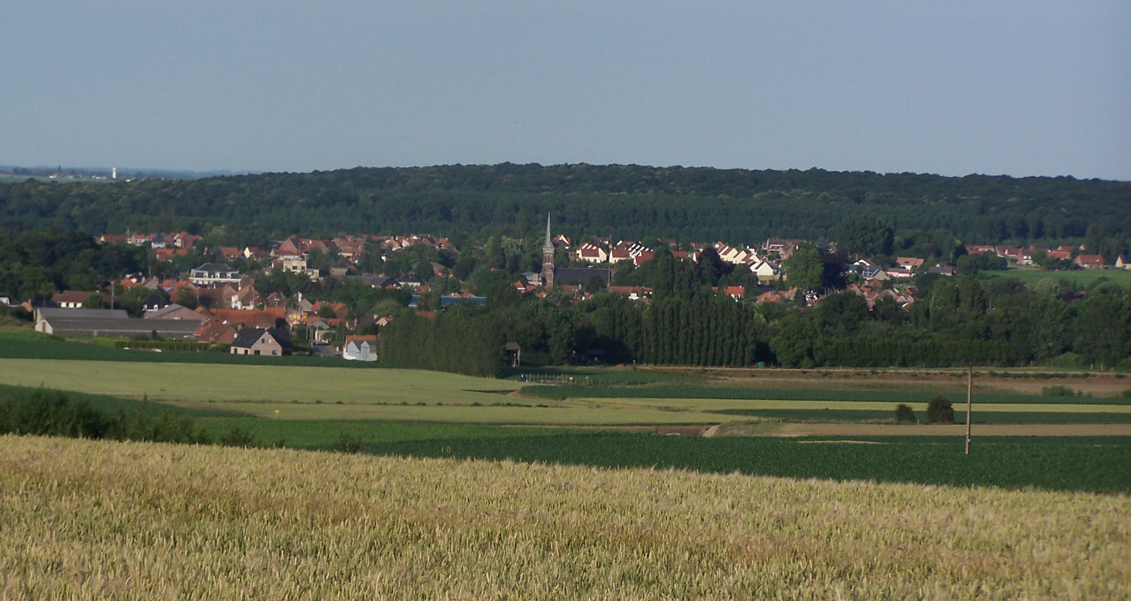 Vue panoramique d'Allouagne depuis la Via Francigena